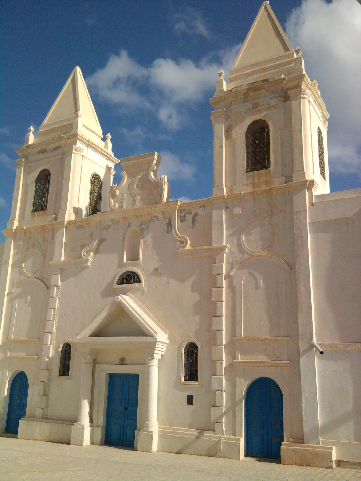 Tunisie, Djerba, Eglise Saint-Joseph de culte catholique à Houmet Essouk